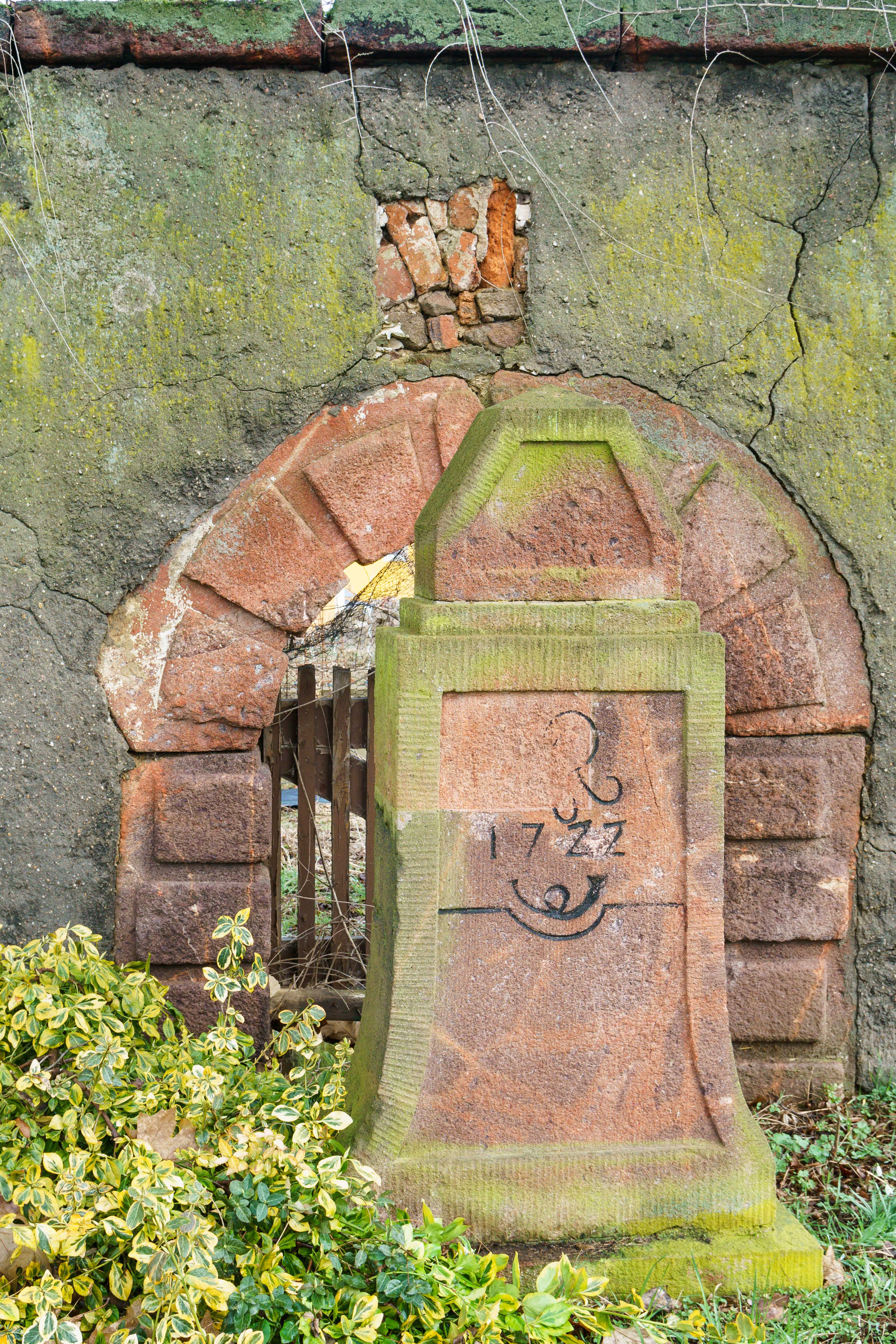 Kursächsischer Viertelmeilenstein Nr. 3 in Grimma OT Bernbruch Text: AR ; 1722 ; Posthorn ; 3